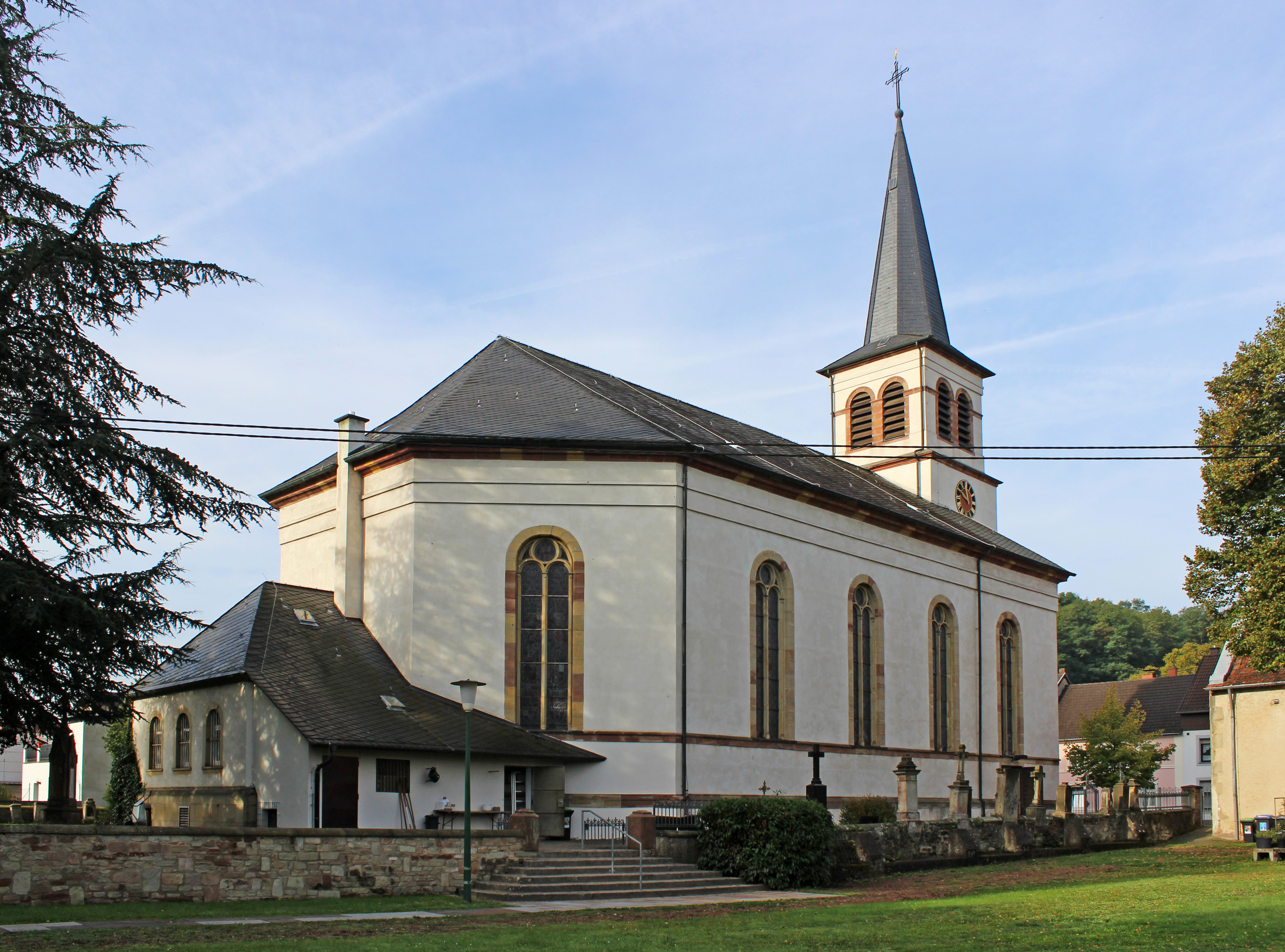 Kath. Pfarrkirche St. Petrus und Paulus in Beaumarais, Stadt Saarlouis, Saarland